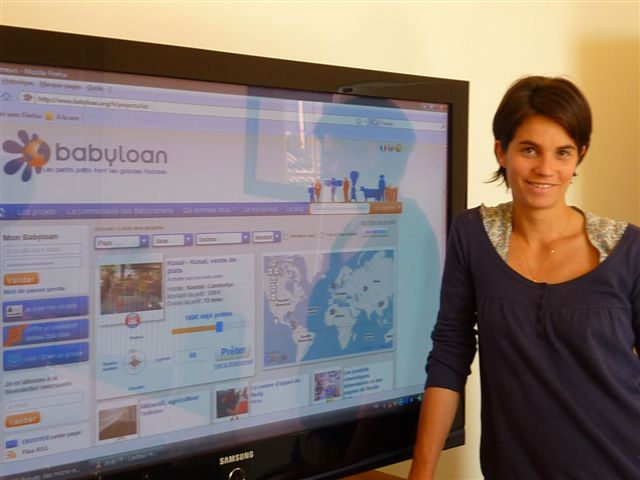 Aurélie Duthoit devant l'écran .